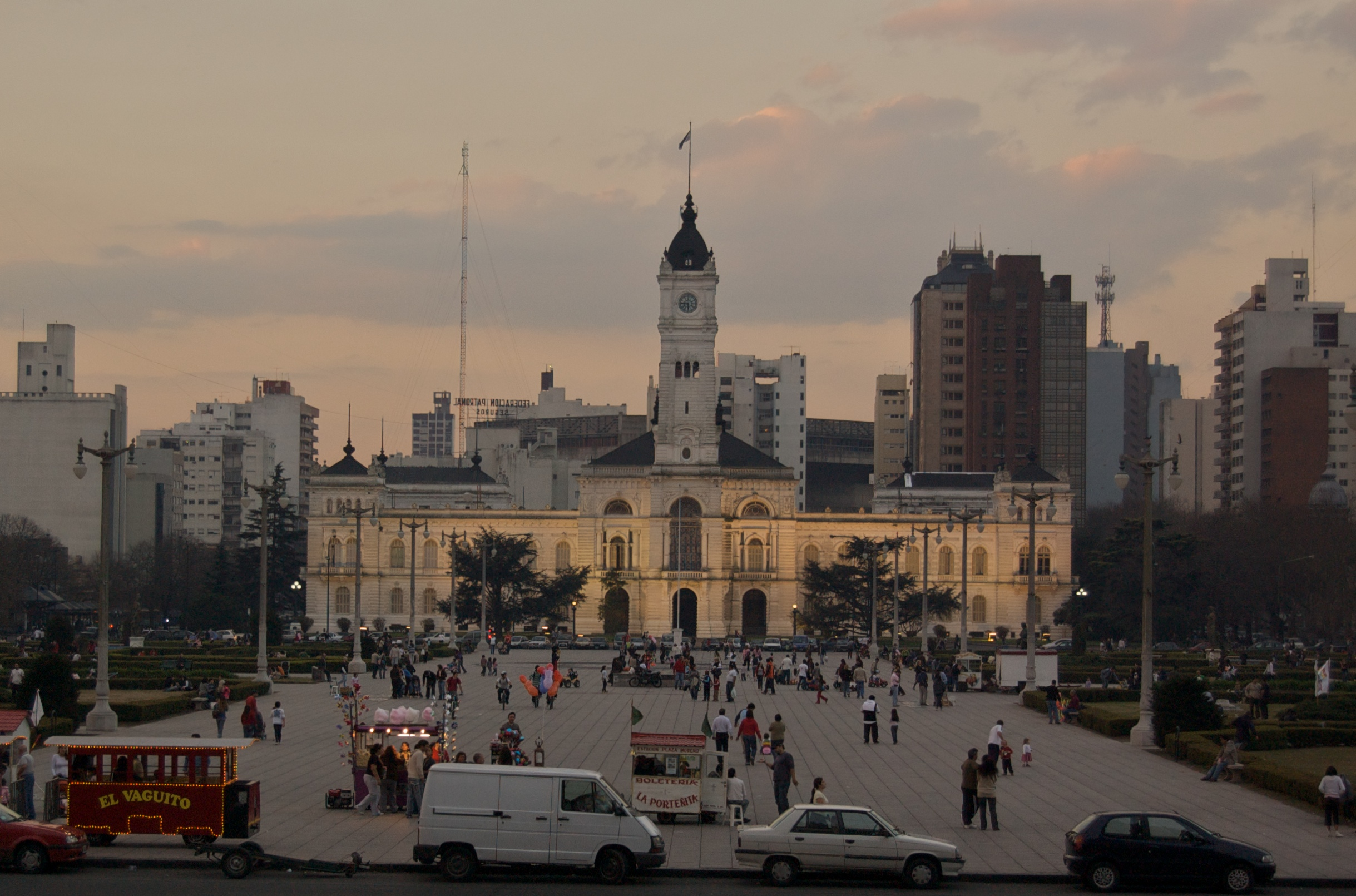 Plaza Moreno and City Hall, La Plata, Argentina.